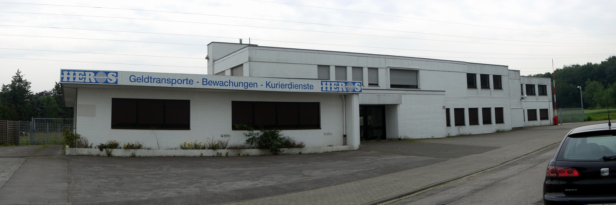 Verlassene Filiale der Heros Unternehmensgruppe in Viersen. Panoramaaufnahme